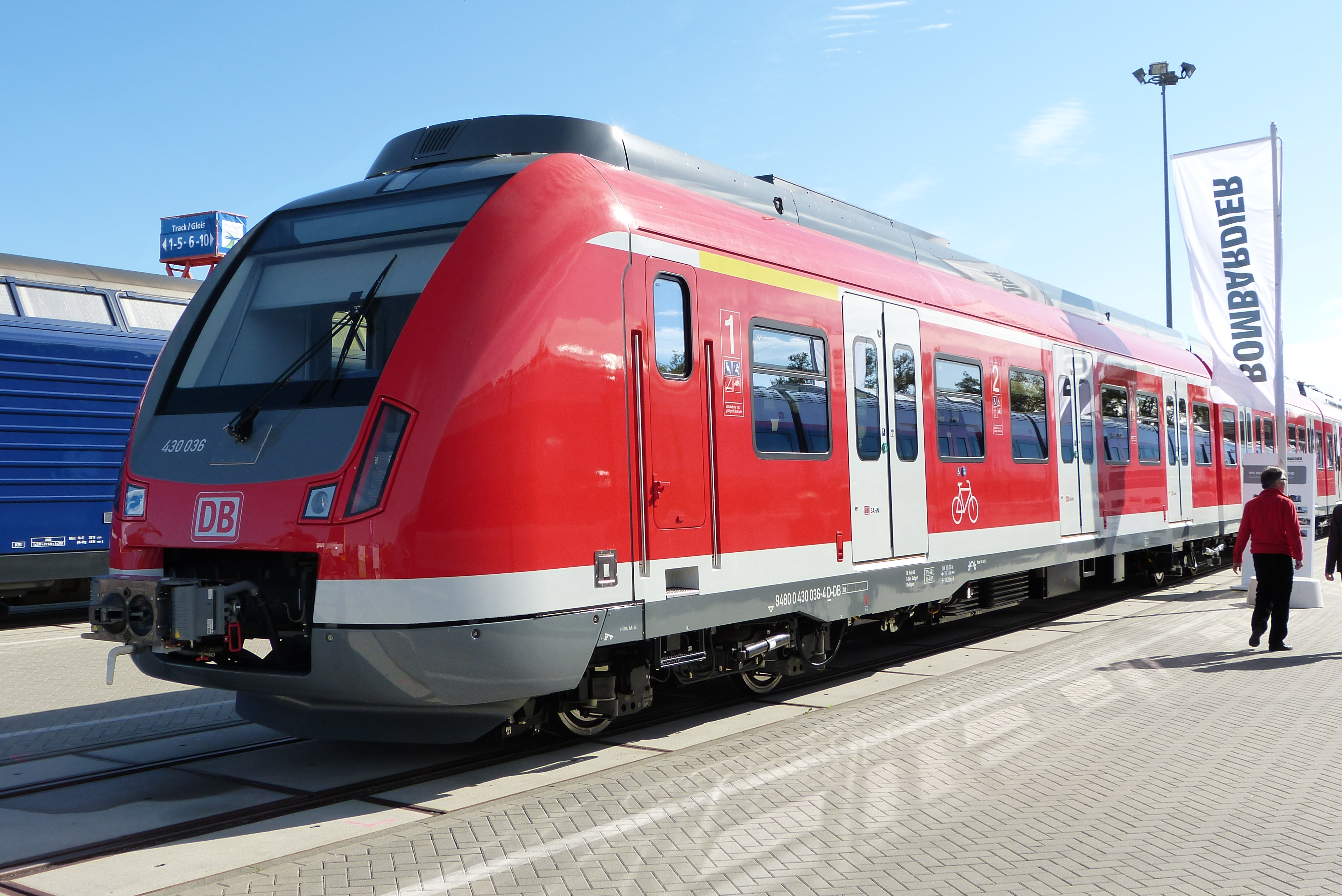 Bombardier-ET BR 430, vorgesehen für S-Bahn Stuttgart, gezeigt auf der InnoTrans 2012 in Berlin.